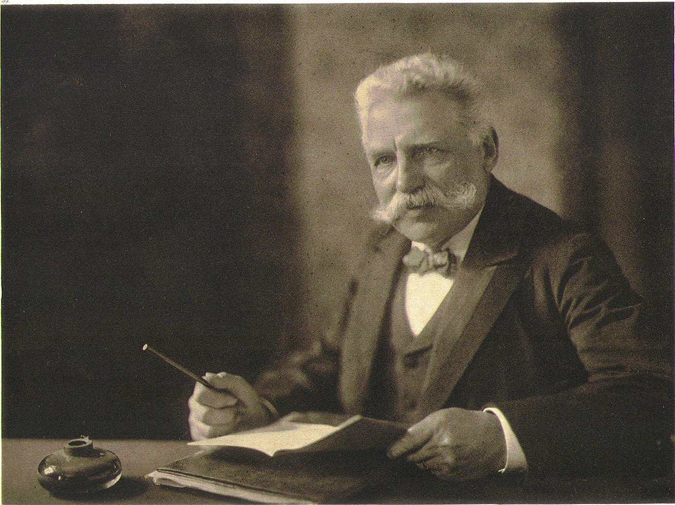 Edmund Siemers, Hamburger Senator und Kaufmann, Gründer der Universität von Hamburg.